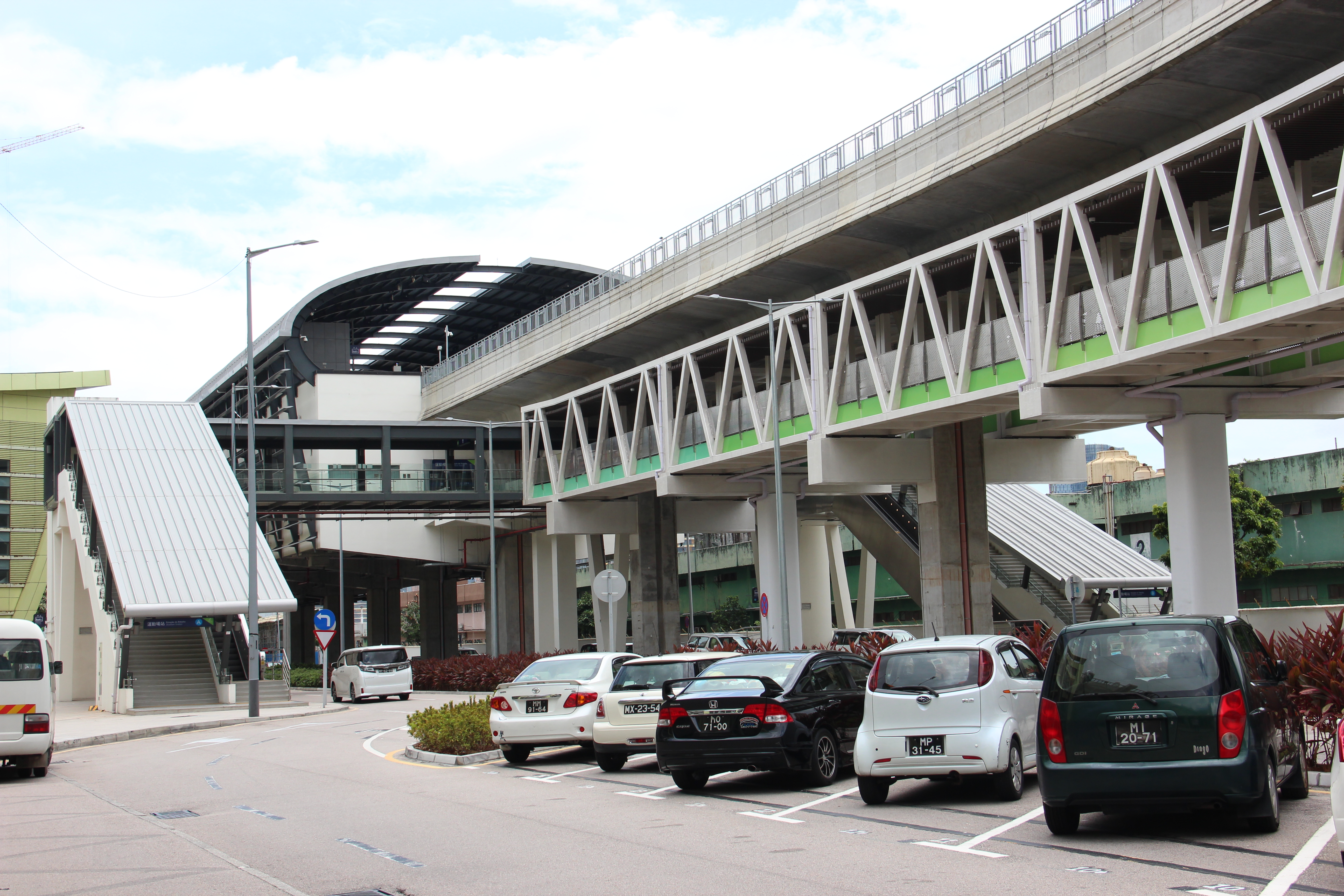 中文（香港）: 澳門輕軌運動場站站體結構